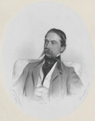 Ferdinand Sternbach (1815–1897)